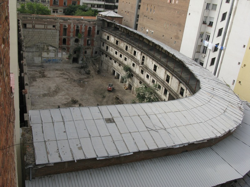 Vista aérea del Frontón Beti-Jai (Madrid)